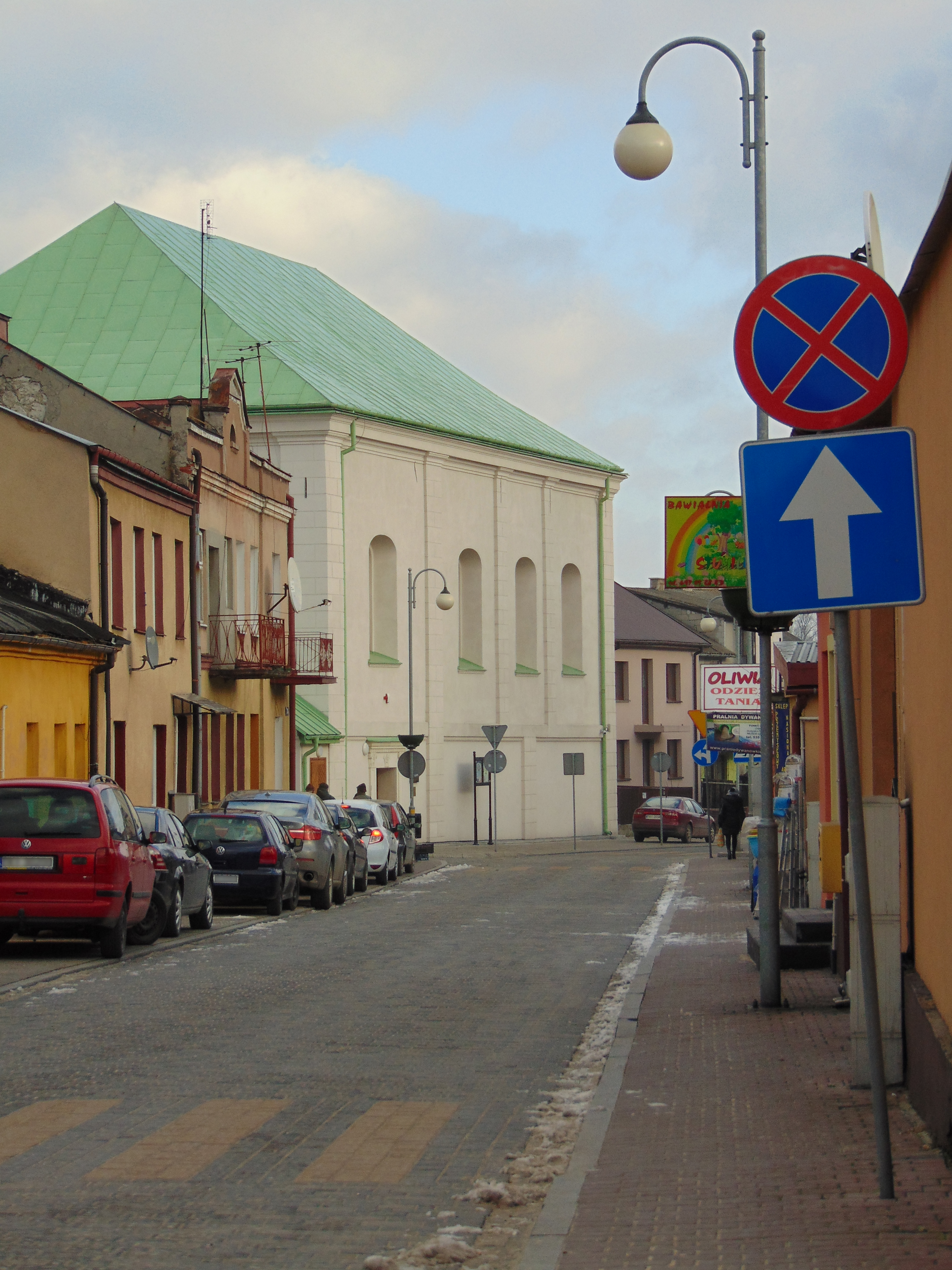 Chmielnik, synagoga, obecnie nieużytkowana, 1630, 1942 r.